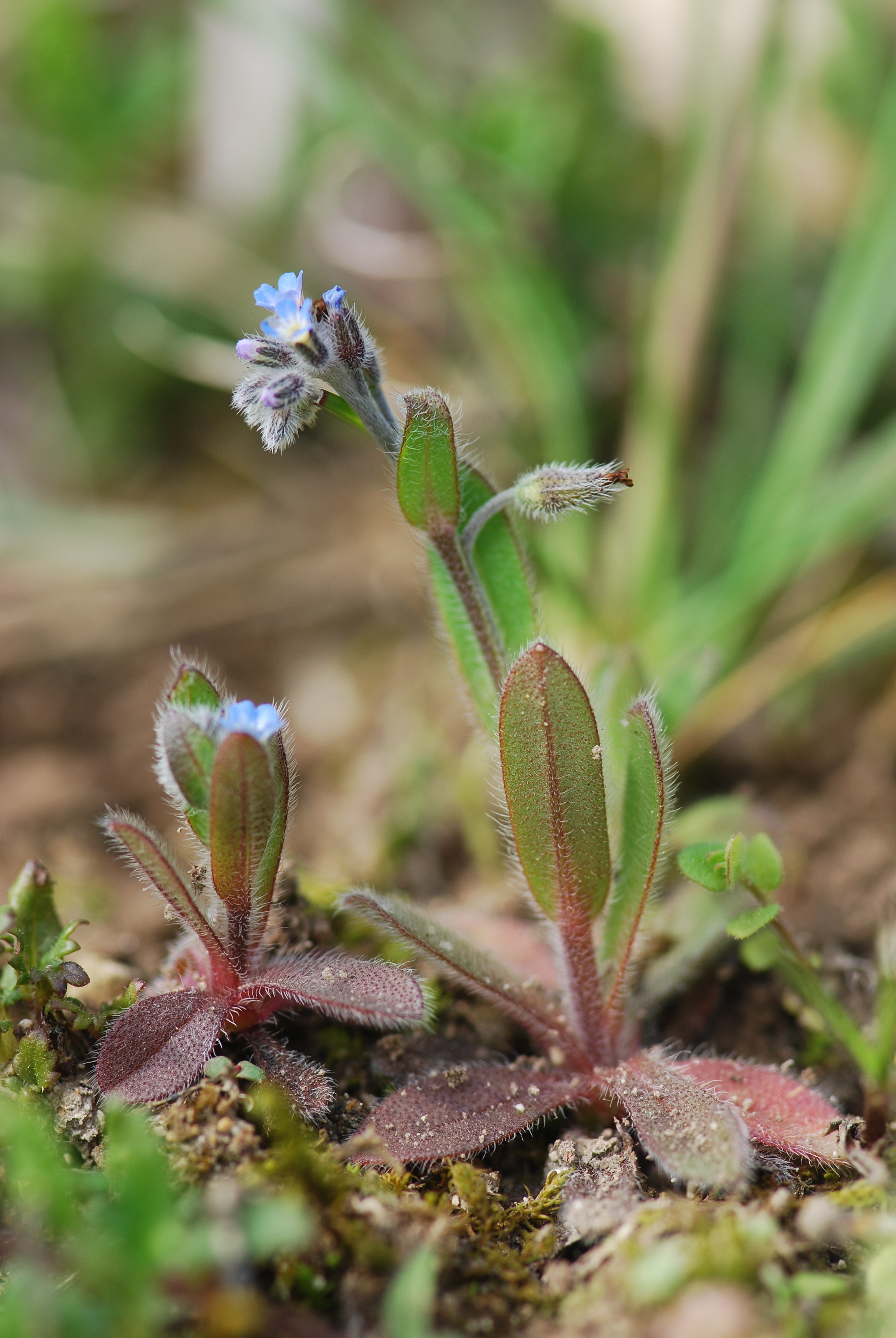 Myosotis ramosissima Route d'Ailly-sur-Meuse (Meuse), France